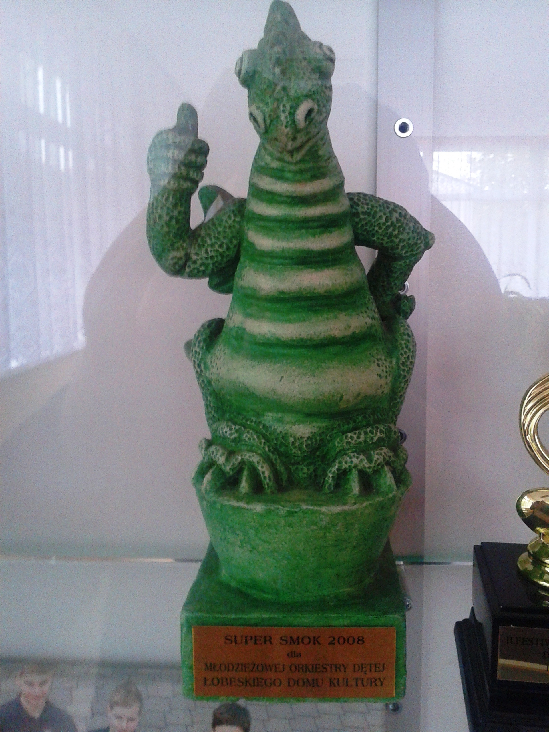 Smok Powiatu Łobez